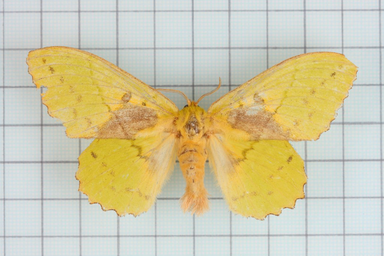 Trabala vishnou guttata (Matsumura,1909) female 綠黃色毛虫 鞍2:P.68,Pl.41-10